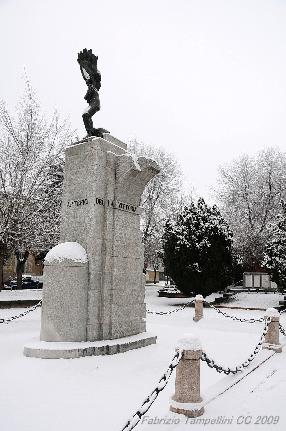 Piave, Cuggiono